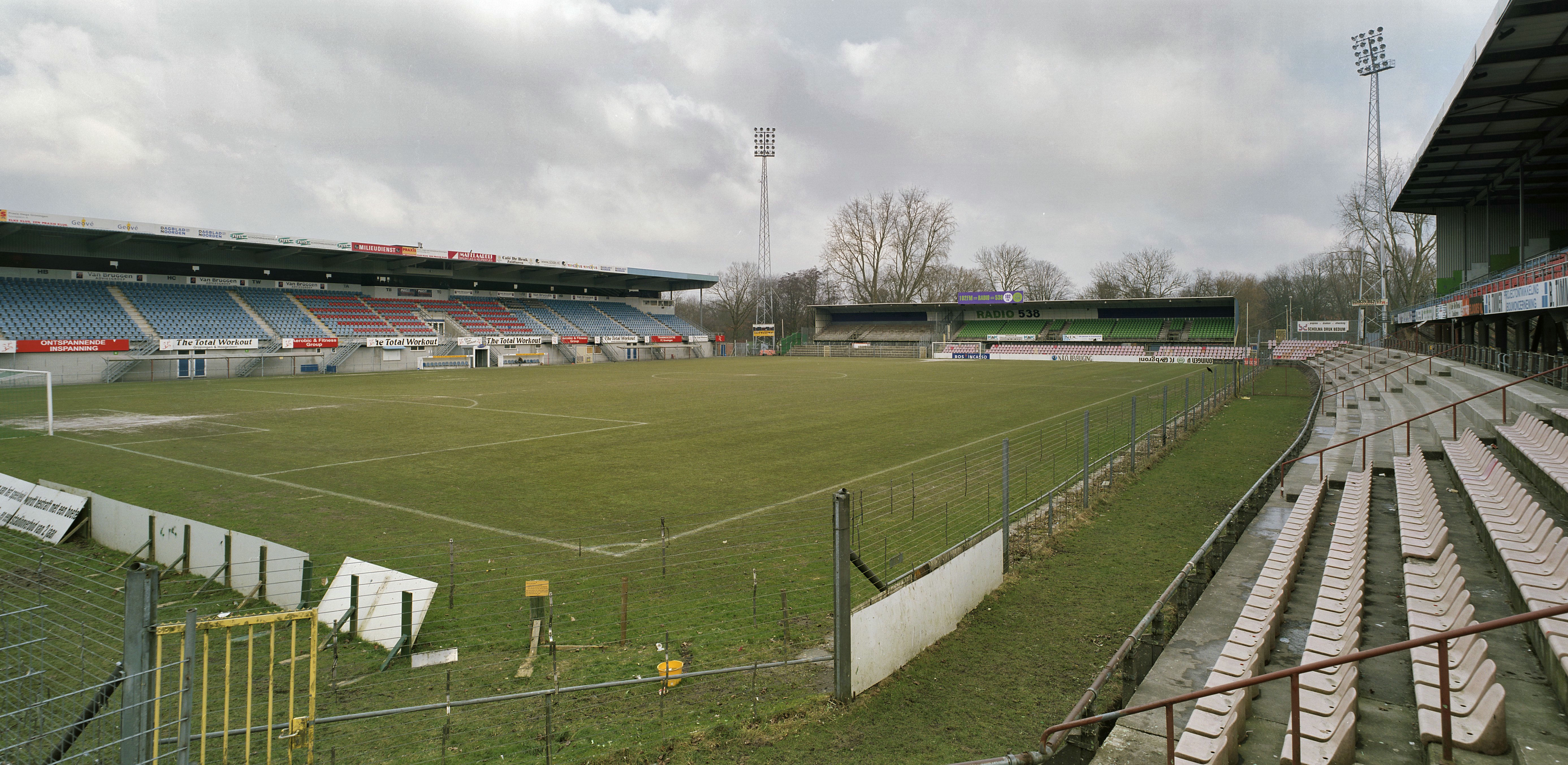 F.C. Groningen Stadion Oosterpark: Overzicht speelveld (opmerking: Stadion gefotografeerd voordat het gesloopt gaat worden)